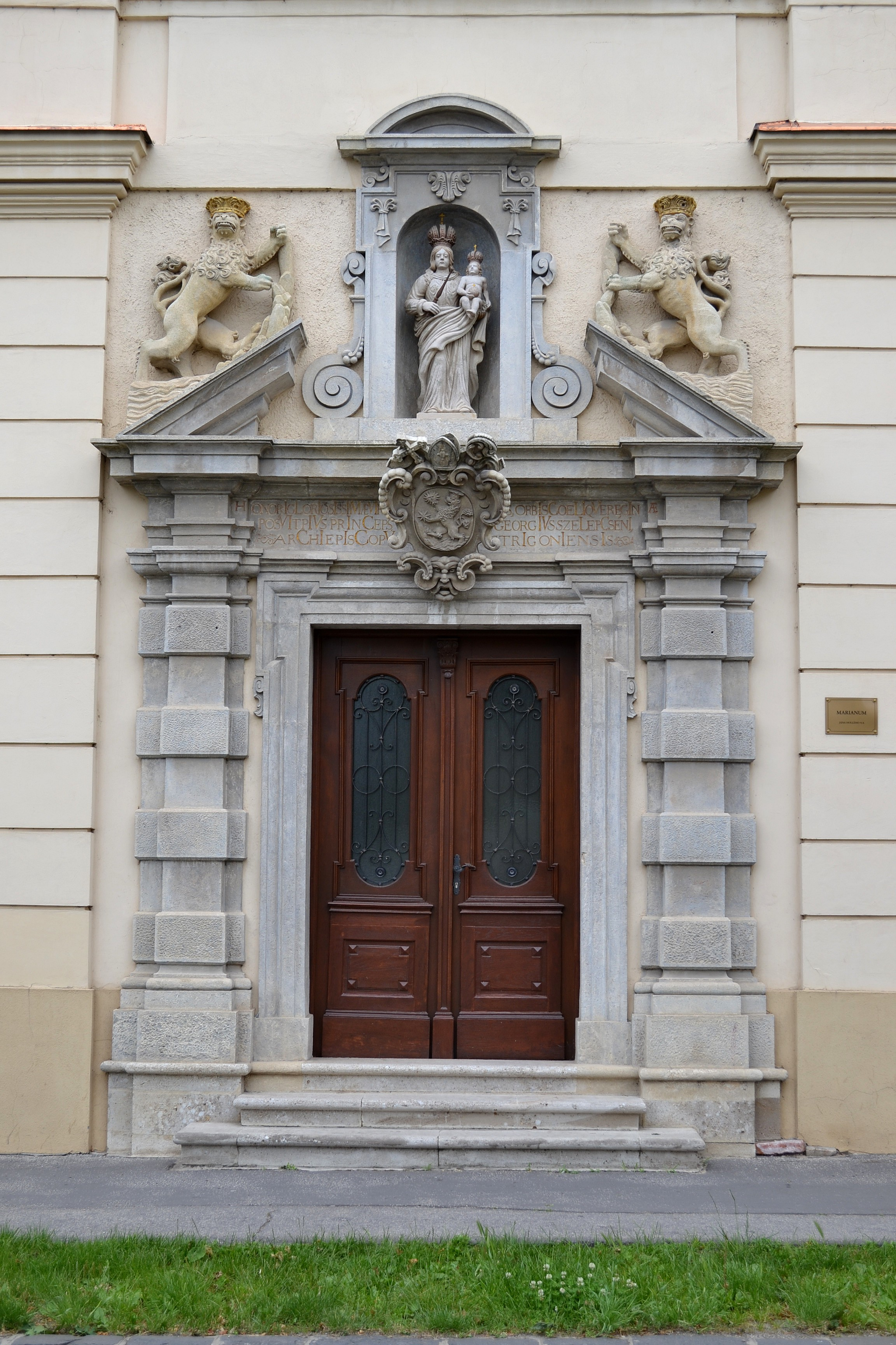 Trnava, komplex univerzitných budov; budova Mariánskeho seminára; portál budovy